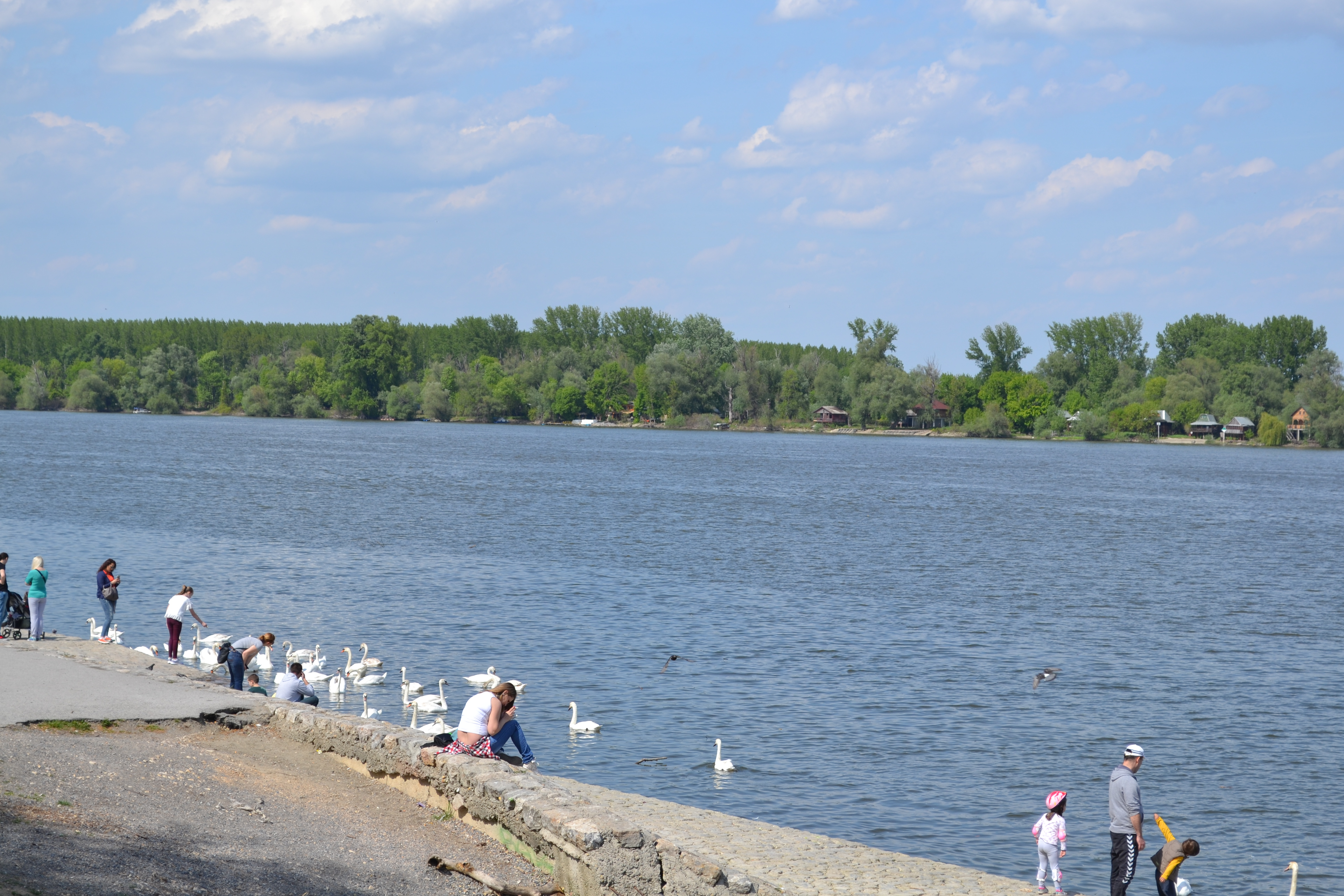 Zemun er en av de 17 bykommunene i Beograd by. Zemun ligger like ved samløpet av elvene Sava og Donau. Kommunen hadde 152 950 innbyggere i 2002, og er en av de største bydelene i Beograd.